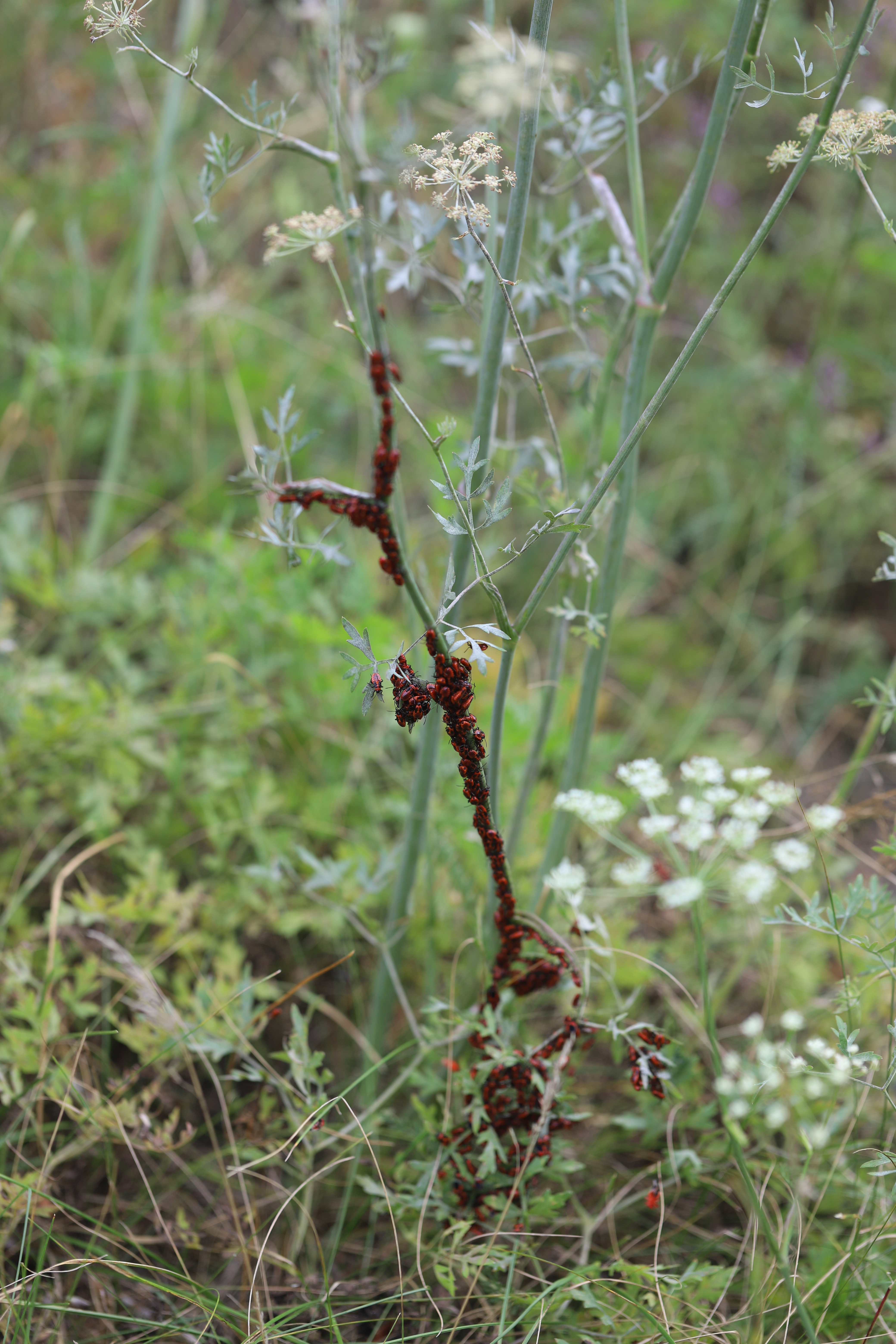 Eine Ansammlung von Nymphen der Schwalbenwurzwanze am 28. Juli 2020 in der Schwetzinger Hardt